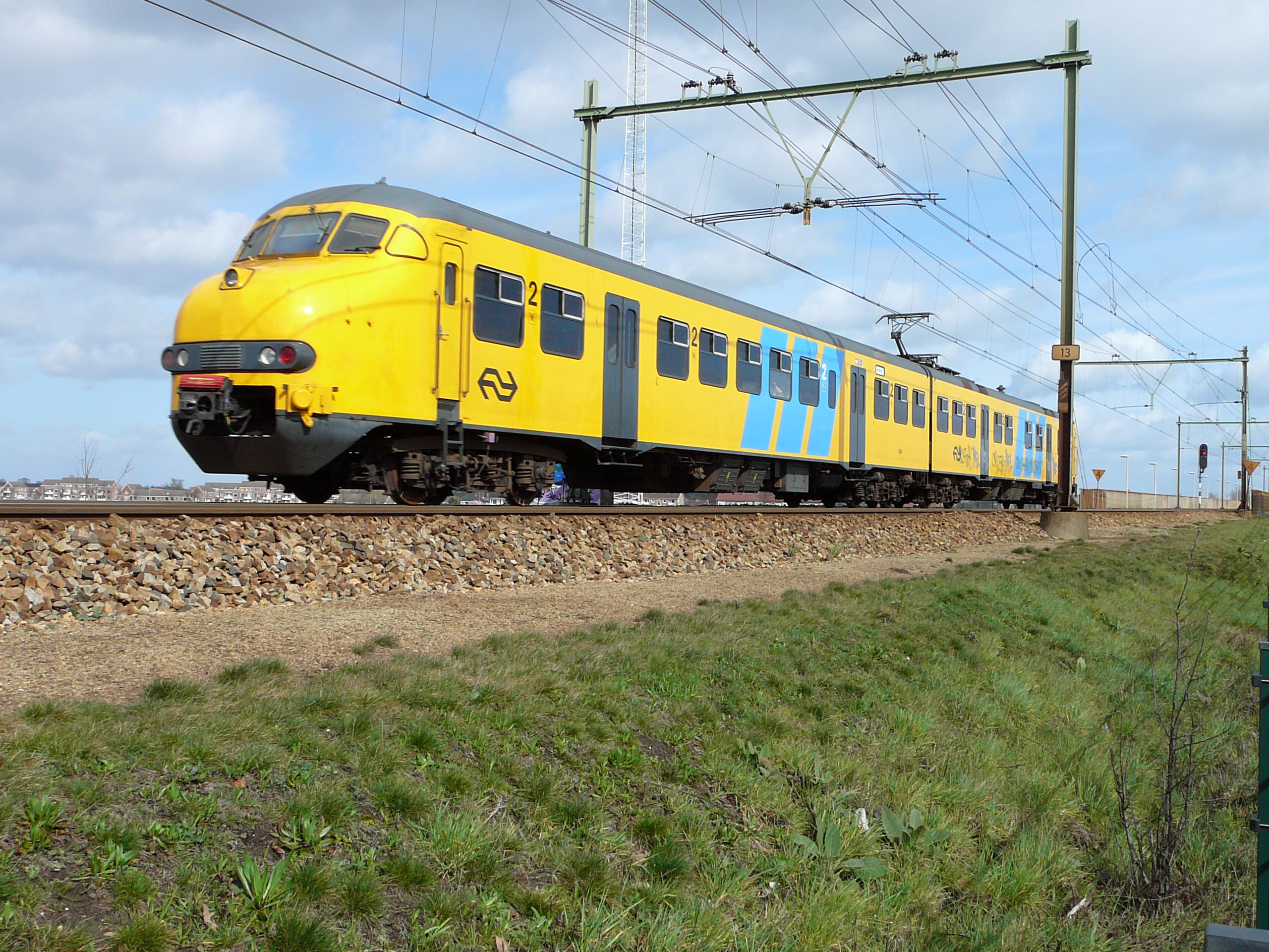 Plan V treinstel 454 onderweg van Almelo naar Apeldoorn in Deventer